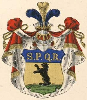 Paulucci suguvõsa markiivapp